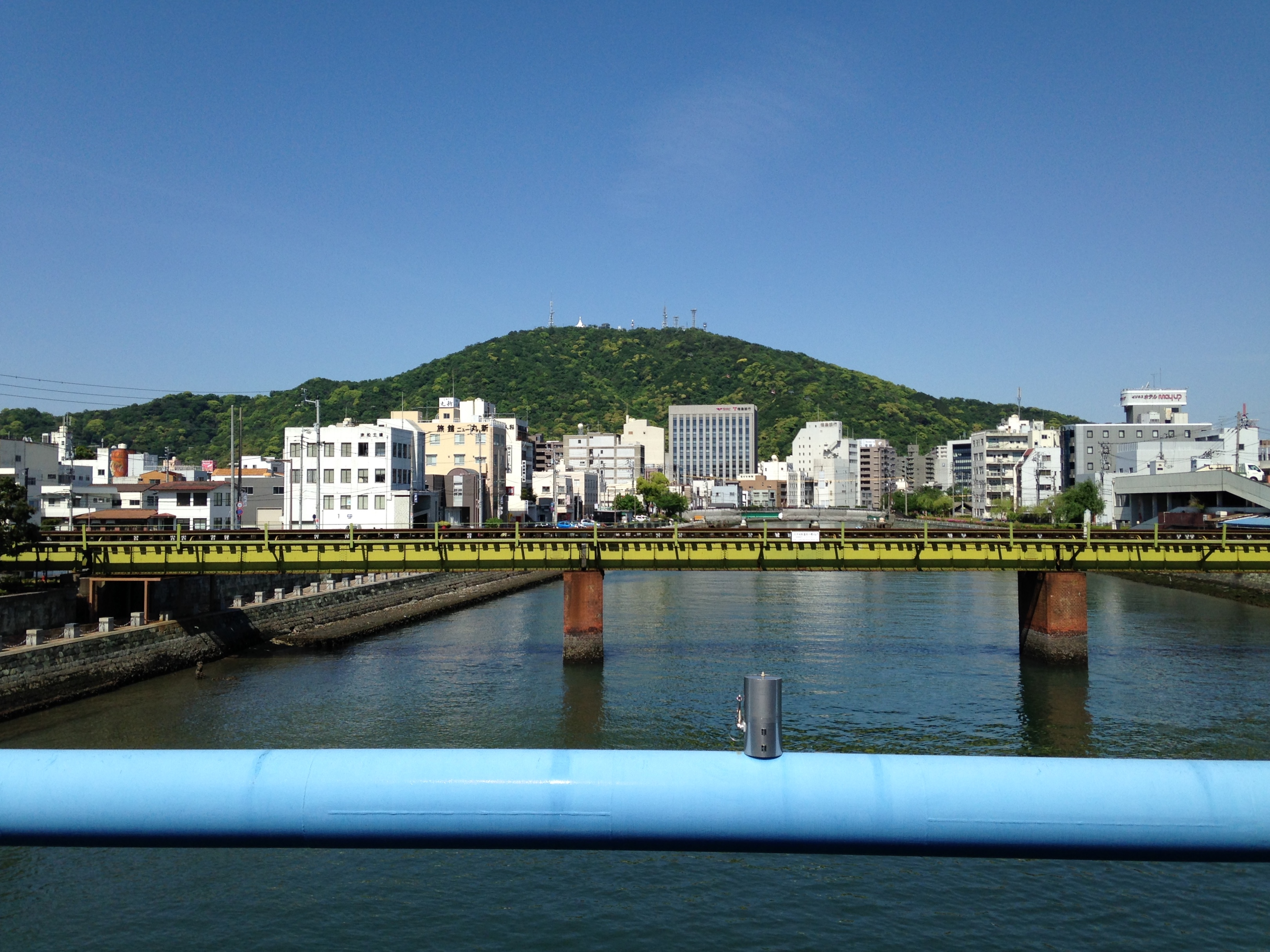 かちどき橋より望む新町川(上流側)、牟岐線の新町川橋梁と眉山